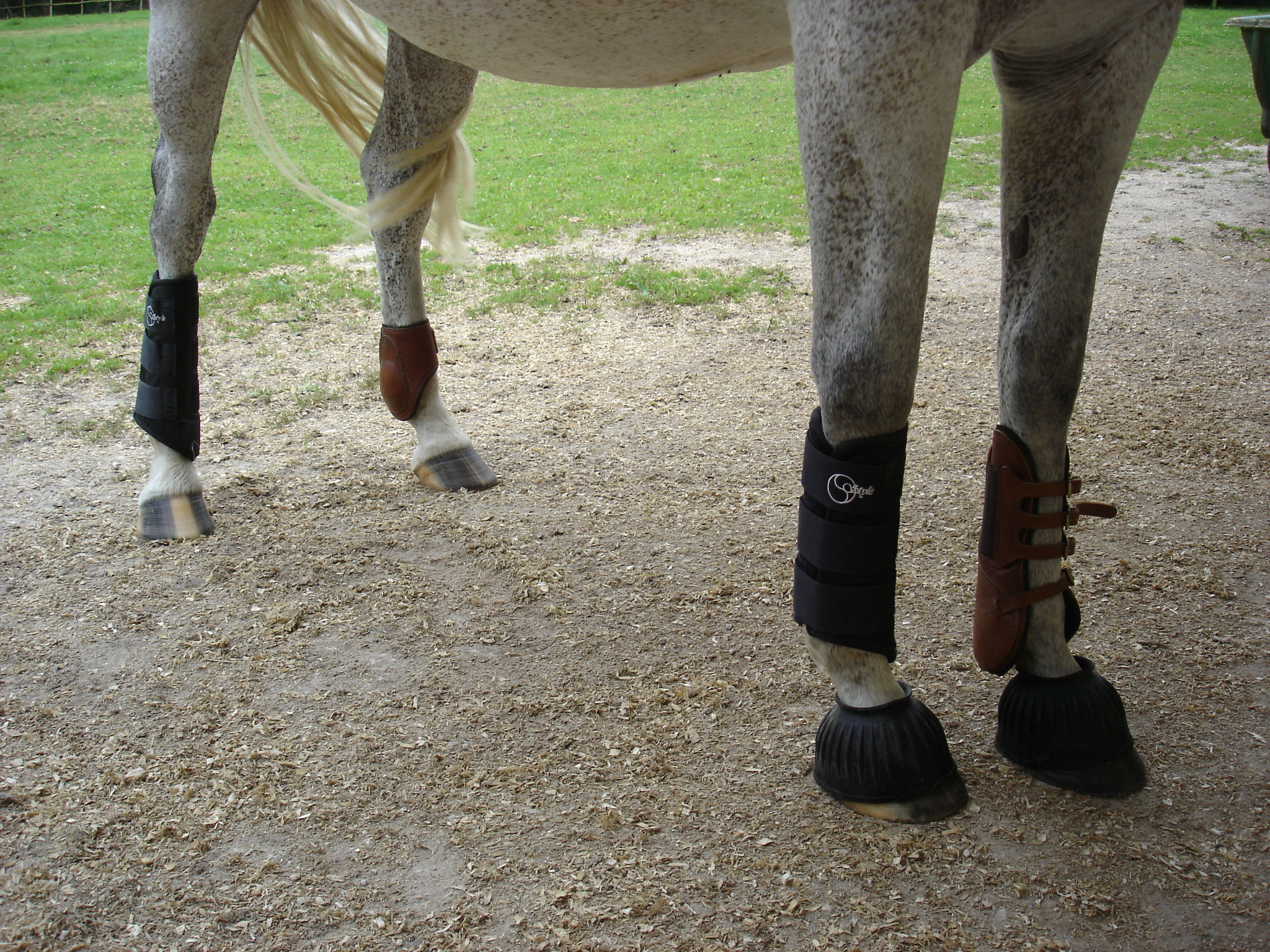 guetres et protège-boulet de CCE sur le latéral droit, et de CSO sur le latral gauche